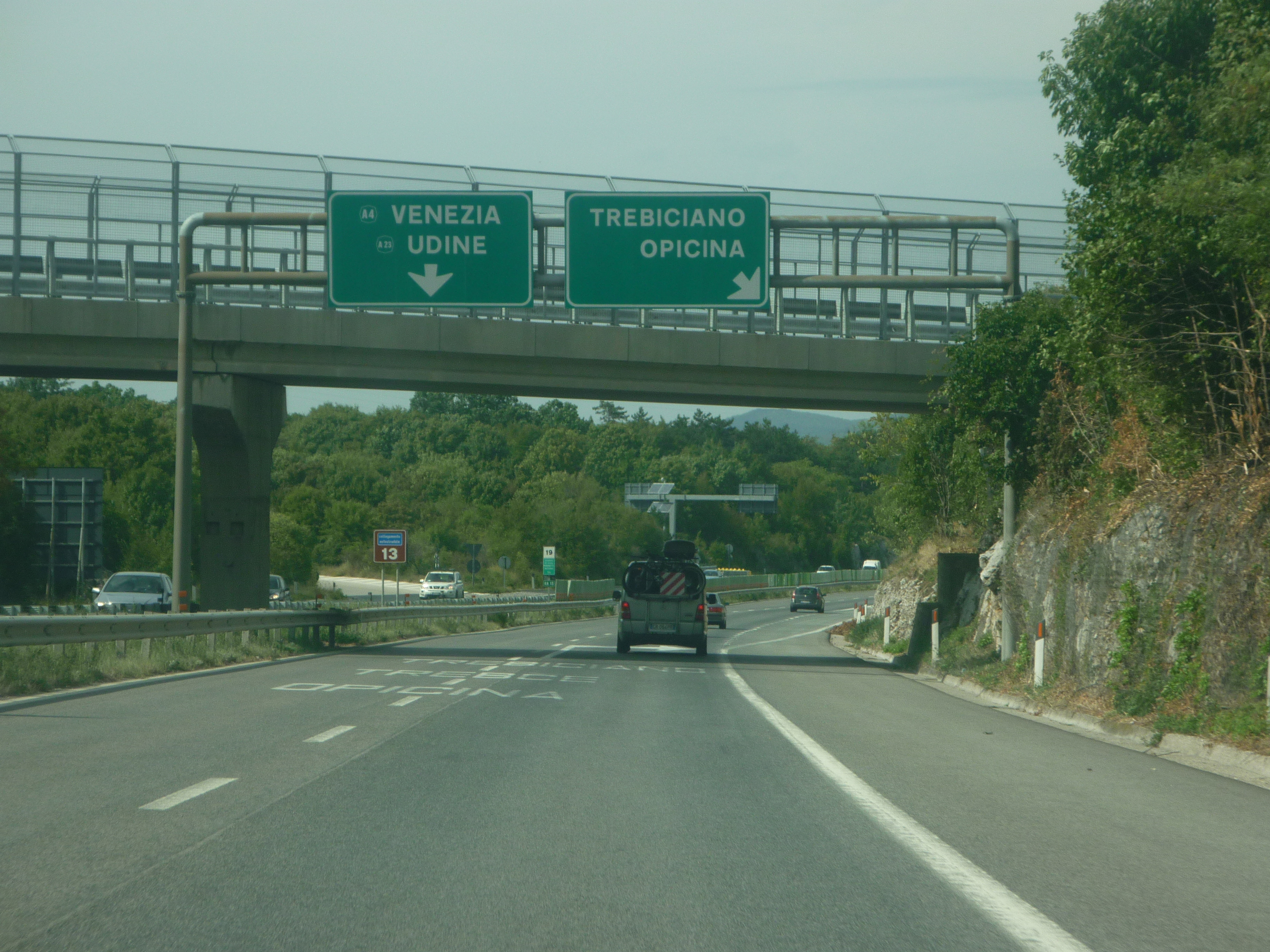 ra13